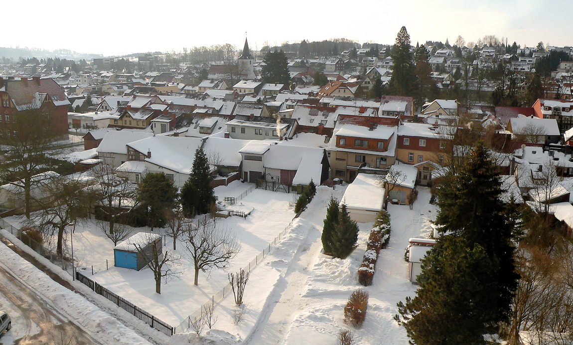 Bad Sachsa